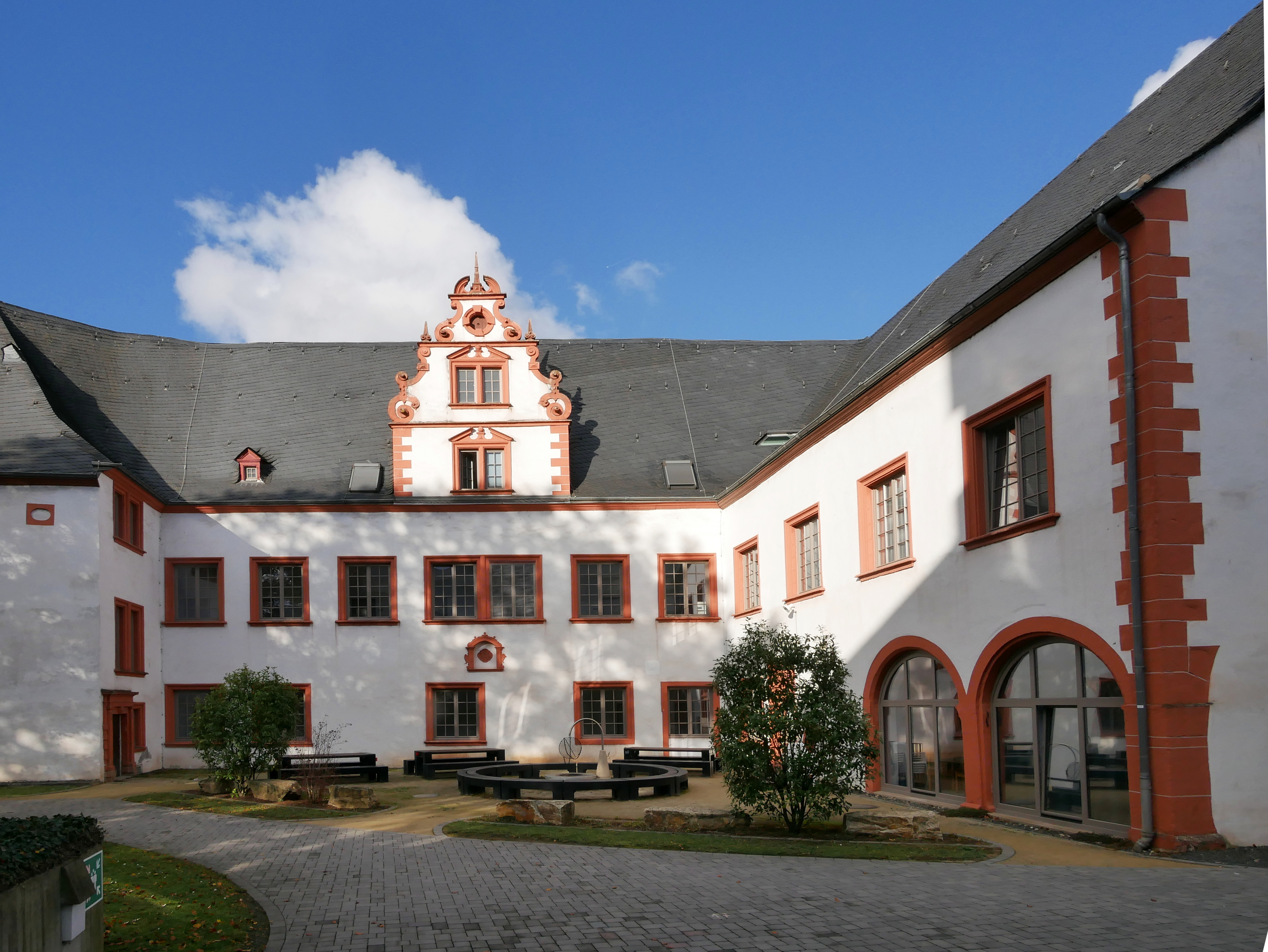 Martinskloster Trier, Renaissancebau vom Innenhof